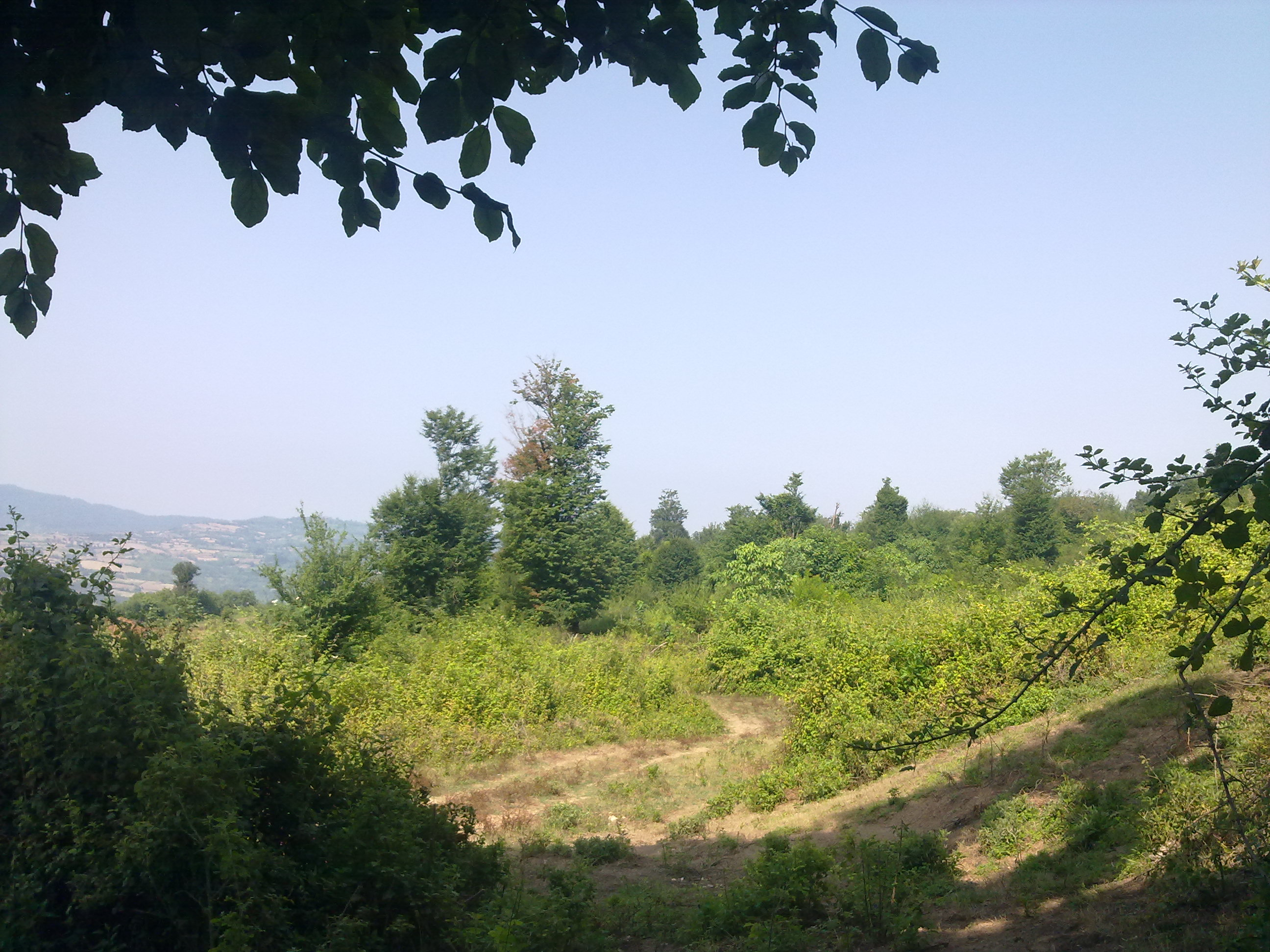 Ahoudasht-Sari-Mazandaran-Iran